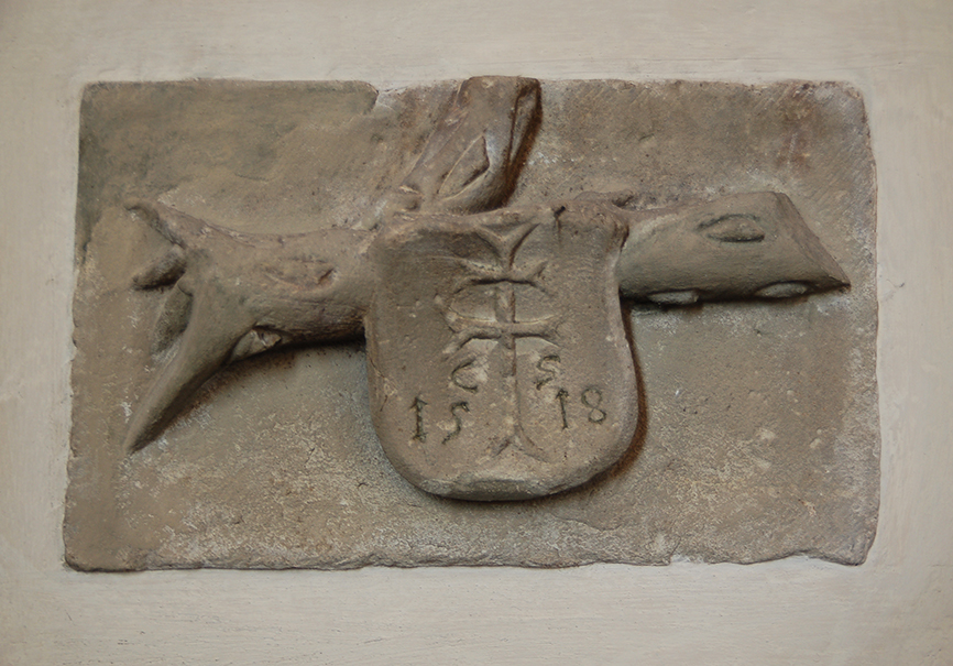 Wappen des Grüninger Heilig-Geist-Spitals Mit Jahreszahl 1518 und Initialen CS im Chor der Kilianskirche in Bissingen. Der Stein soll zuvor Bestandteil der Kirchhofmauer gewesen sein.